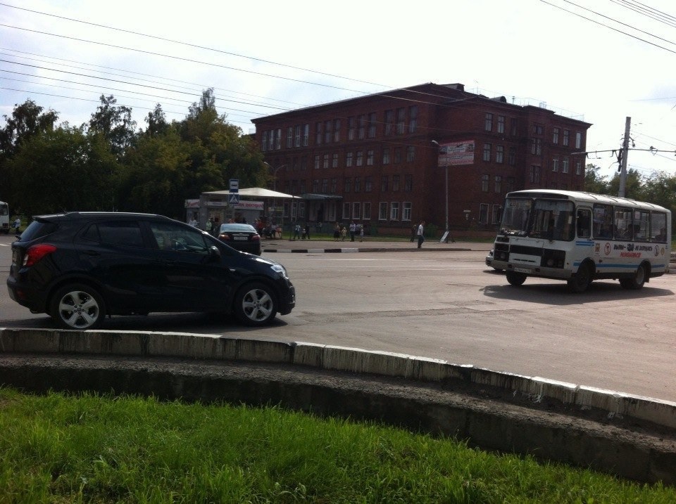 Школа № 53 в Орджоникидзевском районе Новокузнецка (пересечение улиц Разведчиков и Мурманская)